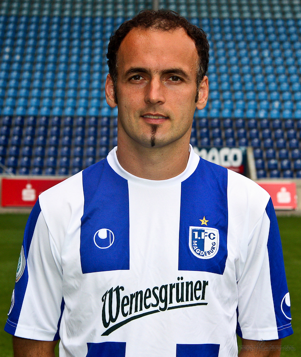 Catalin Racanel im Trikot des 1.FC Magdeburg.